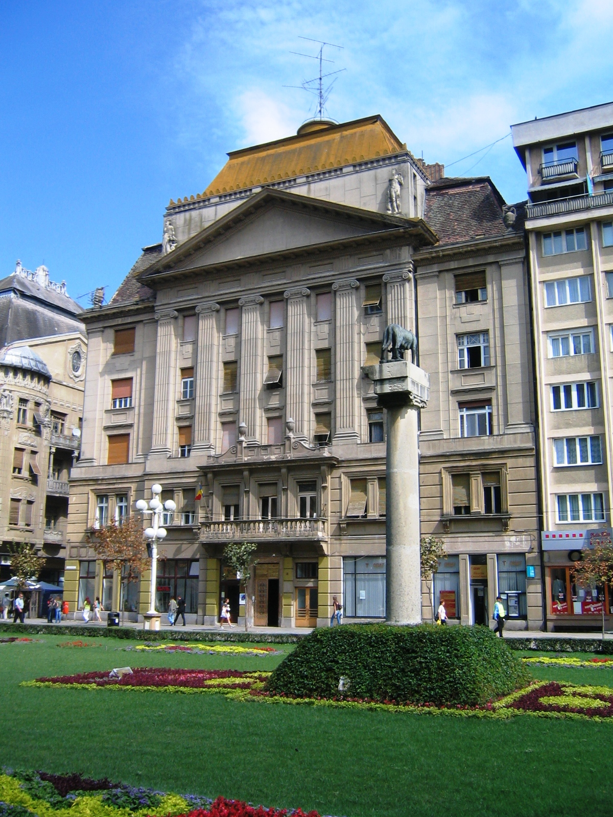 Camera De Comert (Timişoara).